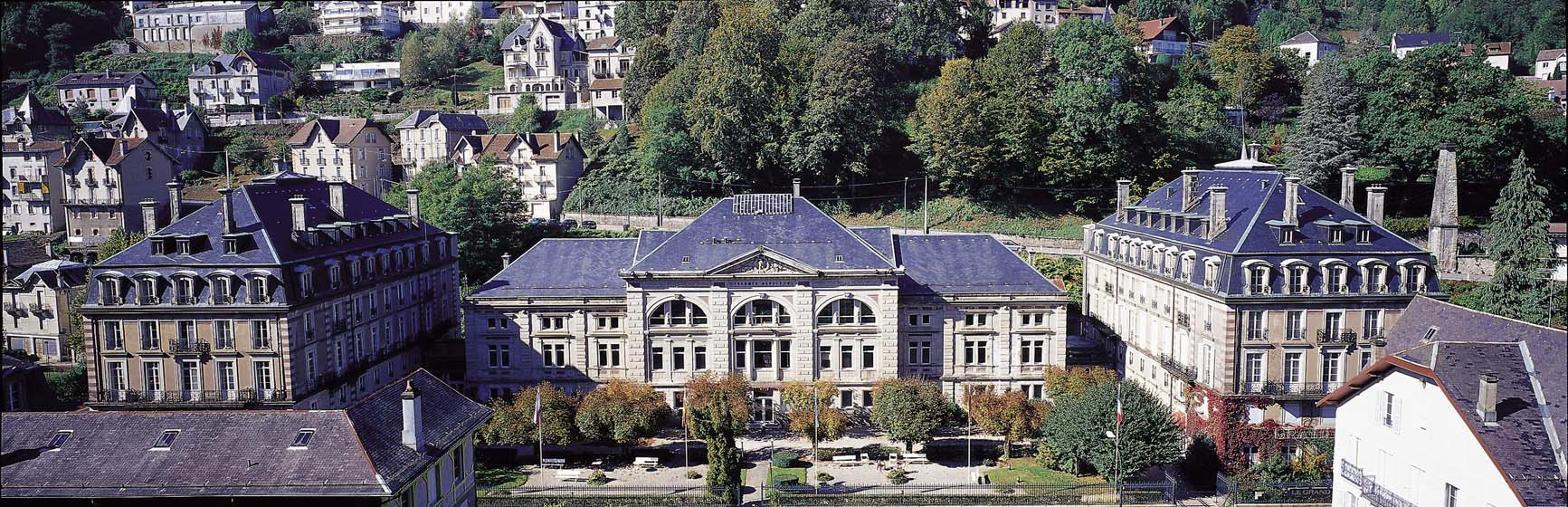 Photo des Thermes Napoléon à Plombières-les-Bains